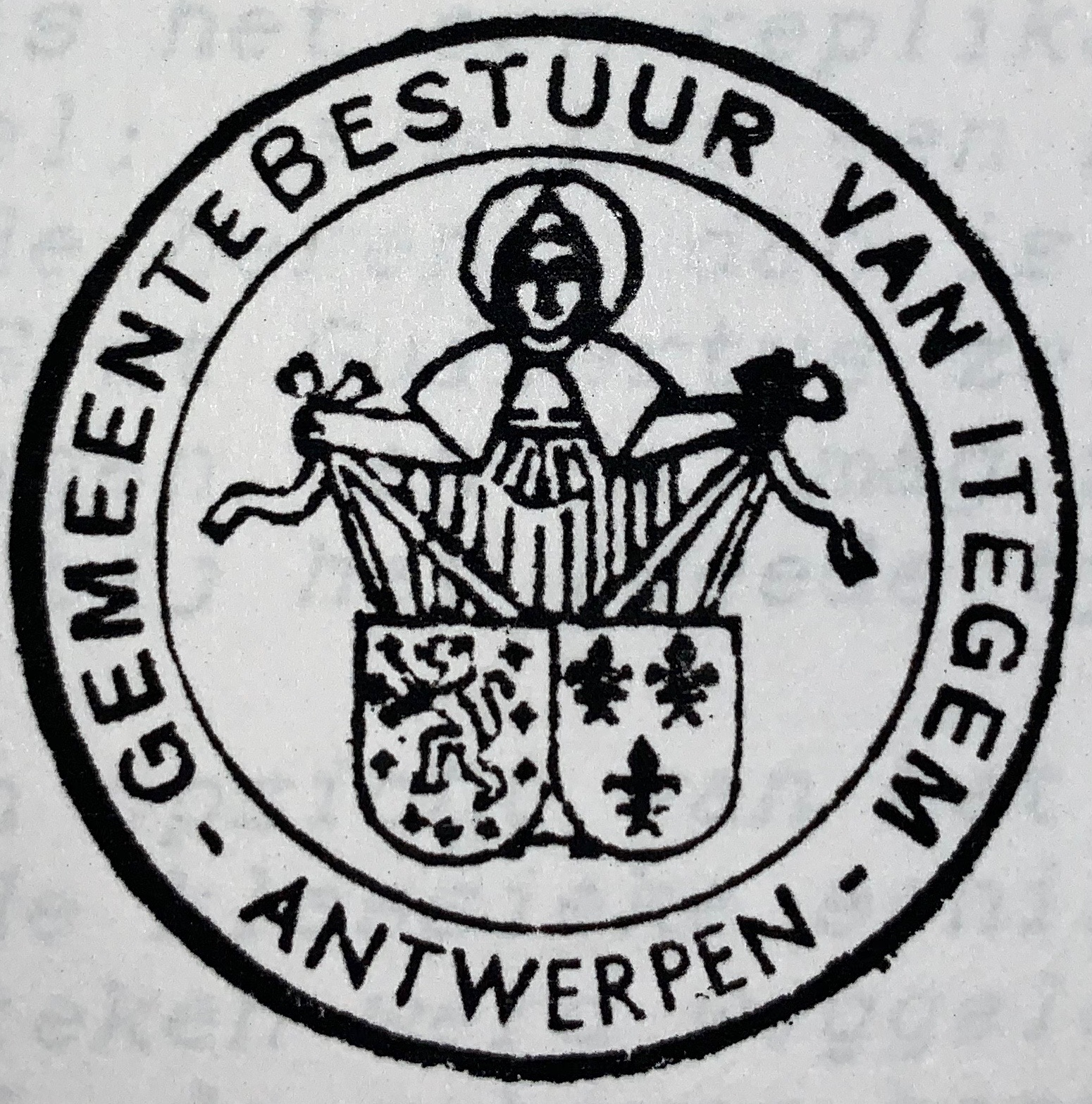 Het wapenschild van Itegem dat sedert de jaren 30 gebruikt wordt.